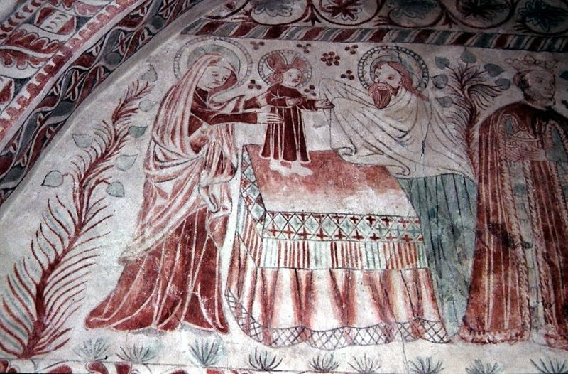 Kirke Stillinge Kirke i Danmark. Korets nordvæg, Fremstillingen og Kongernes tilbedelse